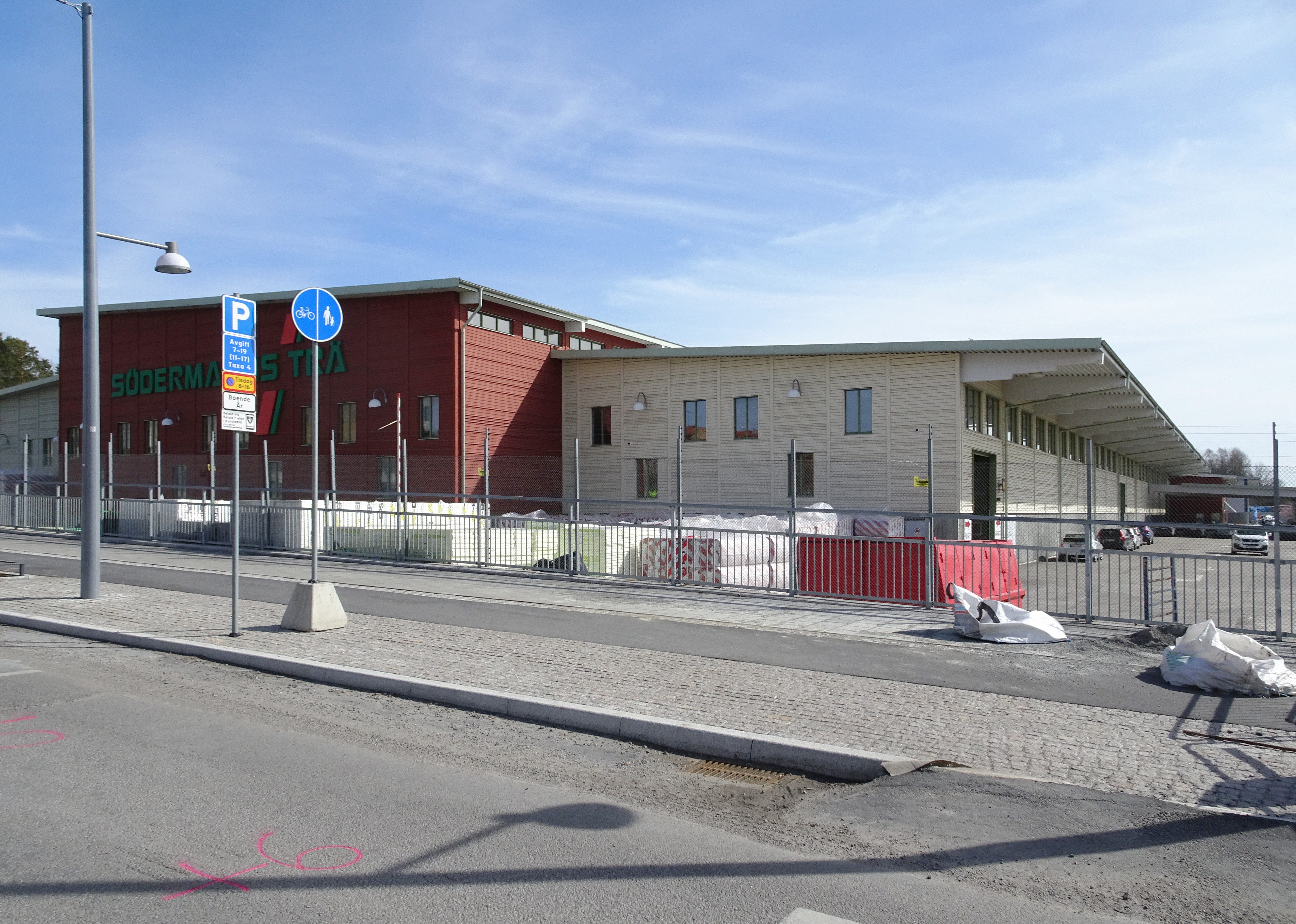 Ahlsell i kvarteret Mejeristen, Enskedefältet